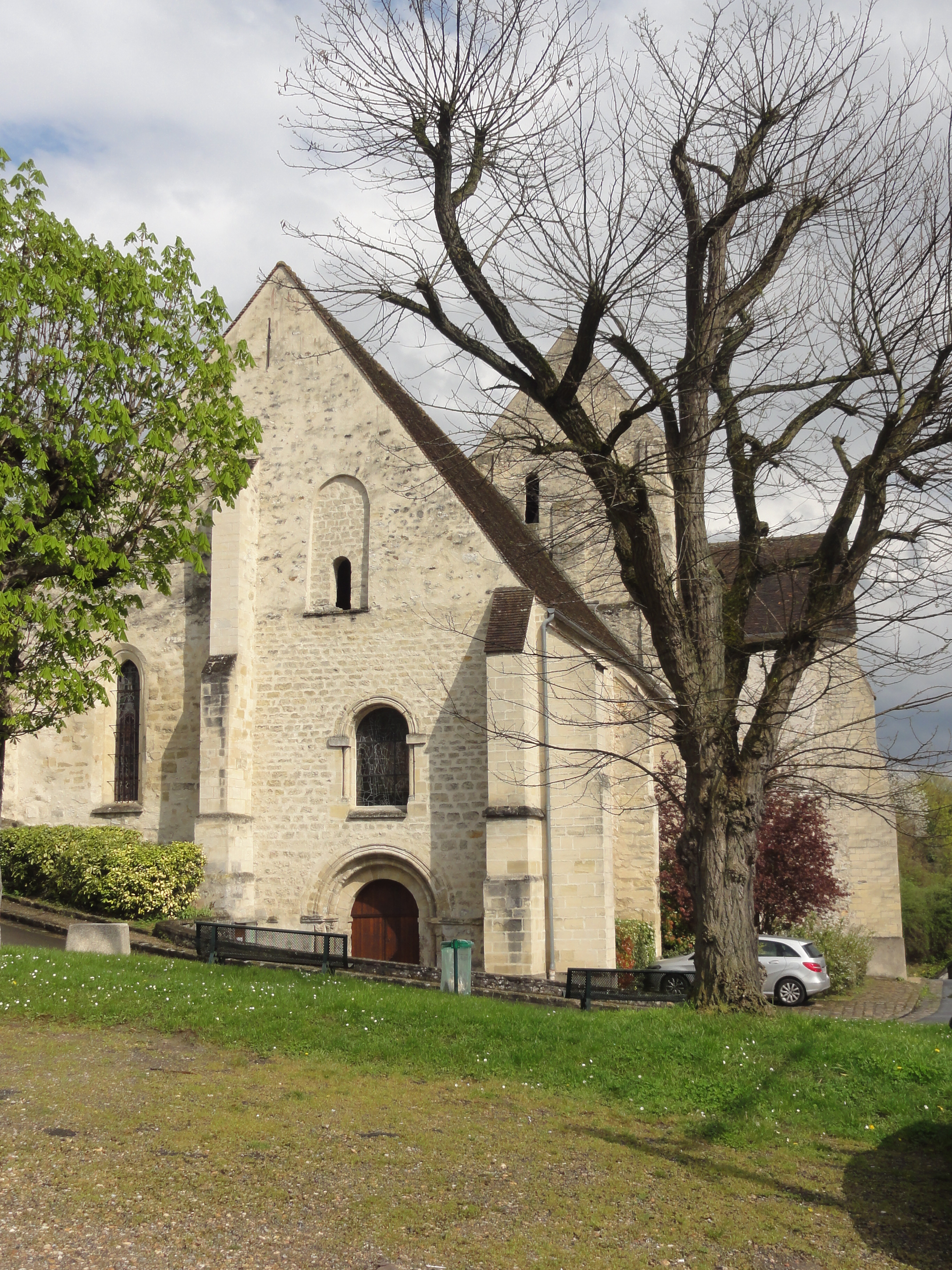 Église Saint-Pierre-aux-Liens de Vaux-sur-Seine - voir titre.